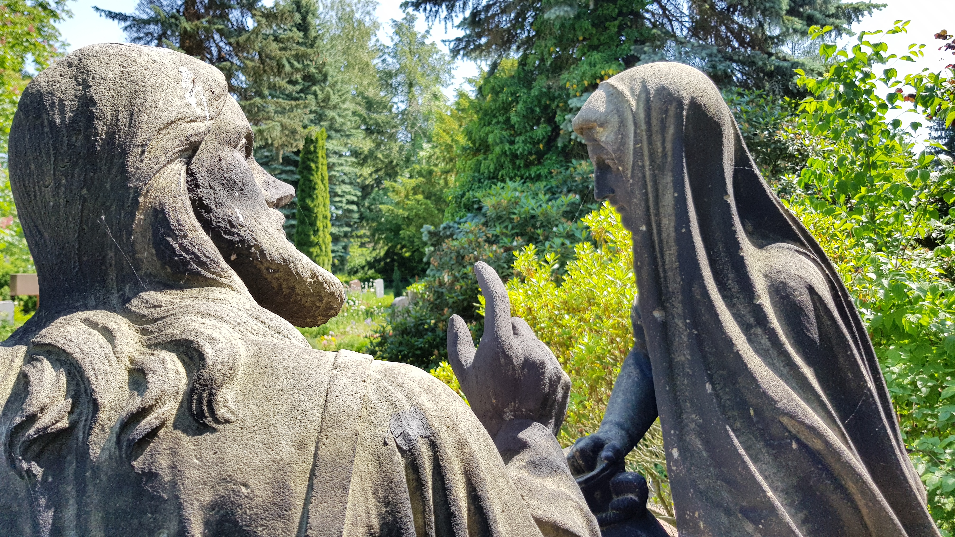 Samariterbrunnen Hainichen, Jesus und Samariterin.